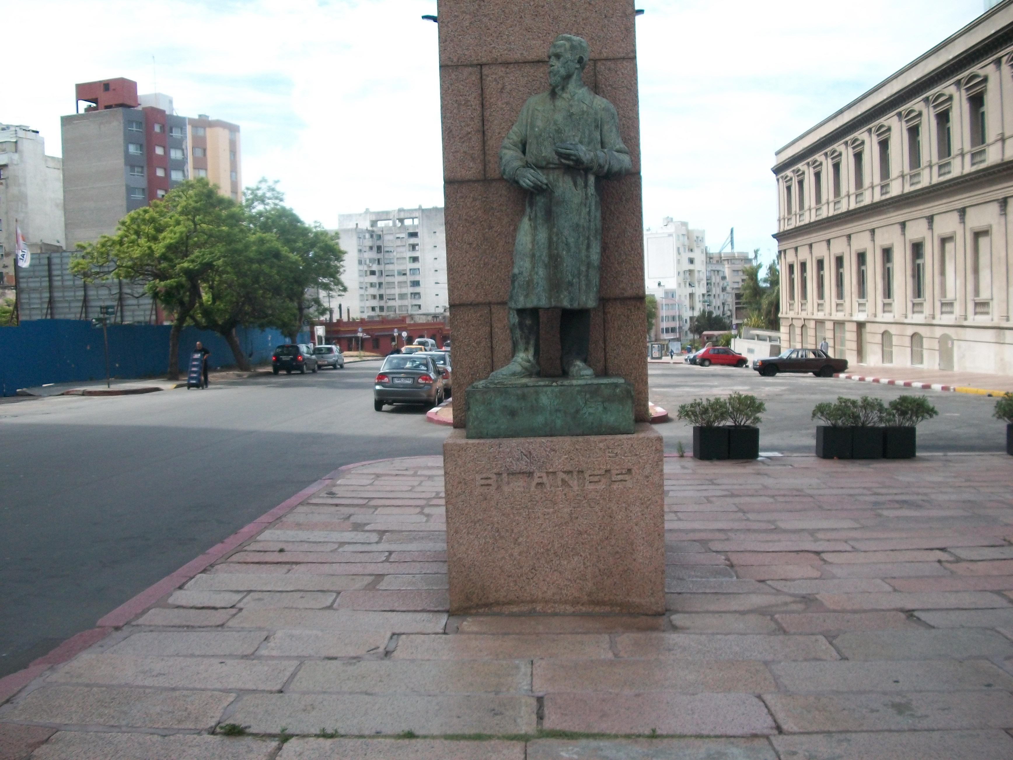 Monumento a Juan Manuel Blanes en la ciudad de Montevideo